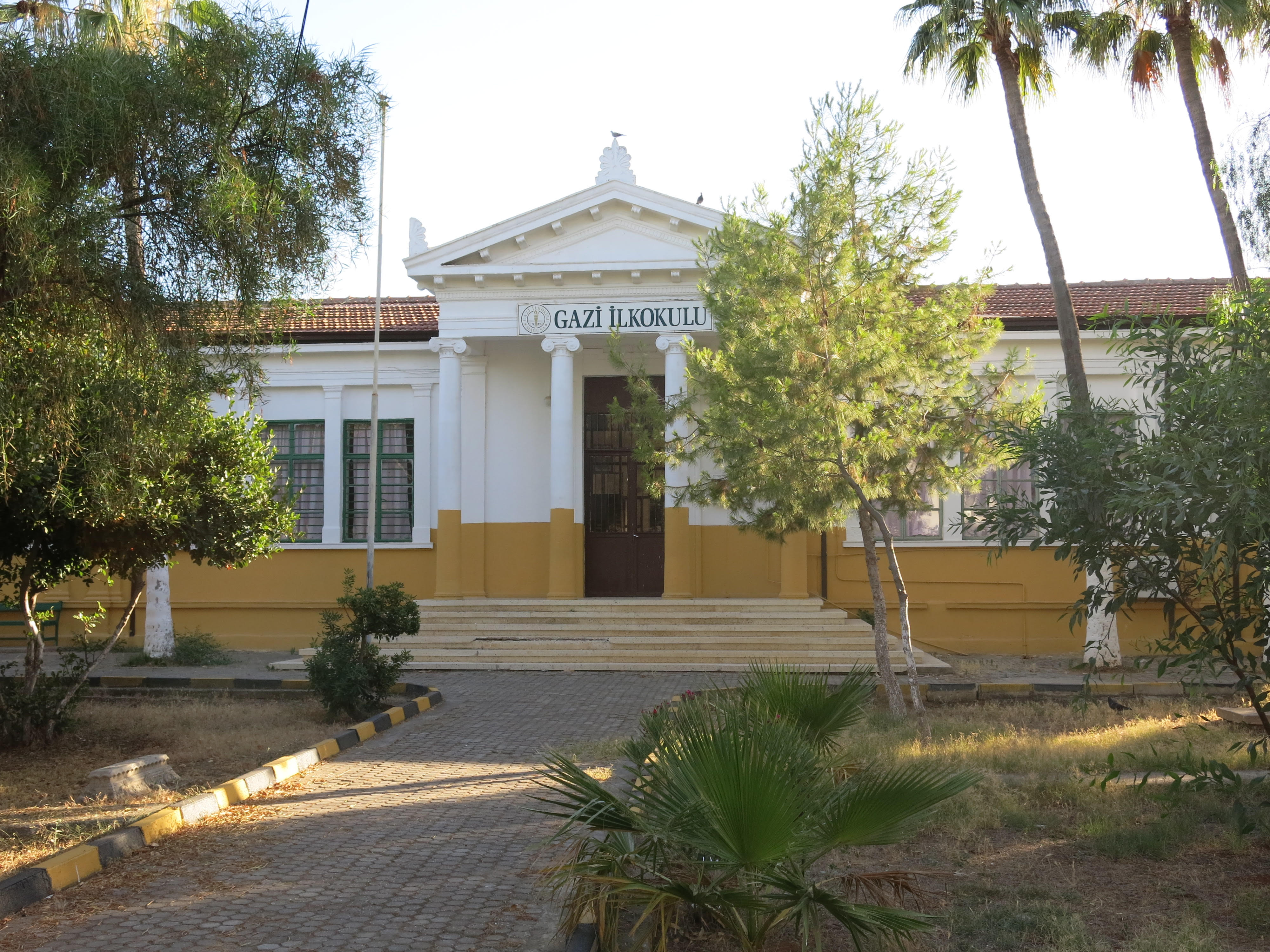 Othomaniki sxoli